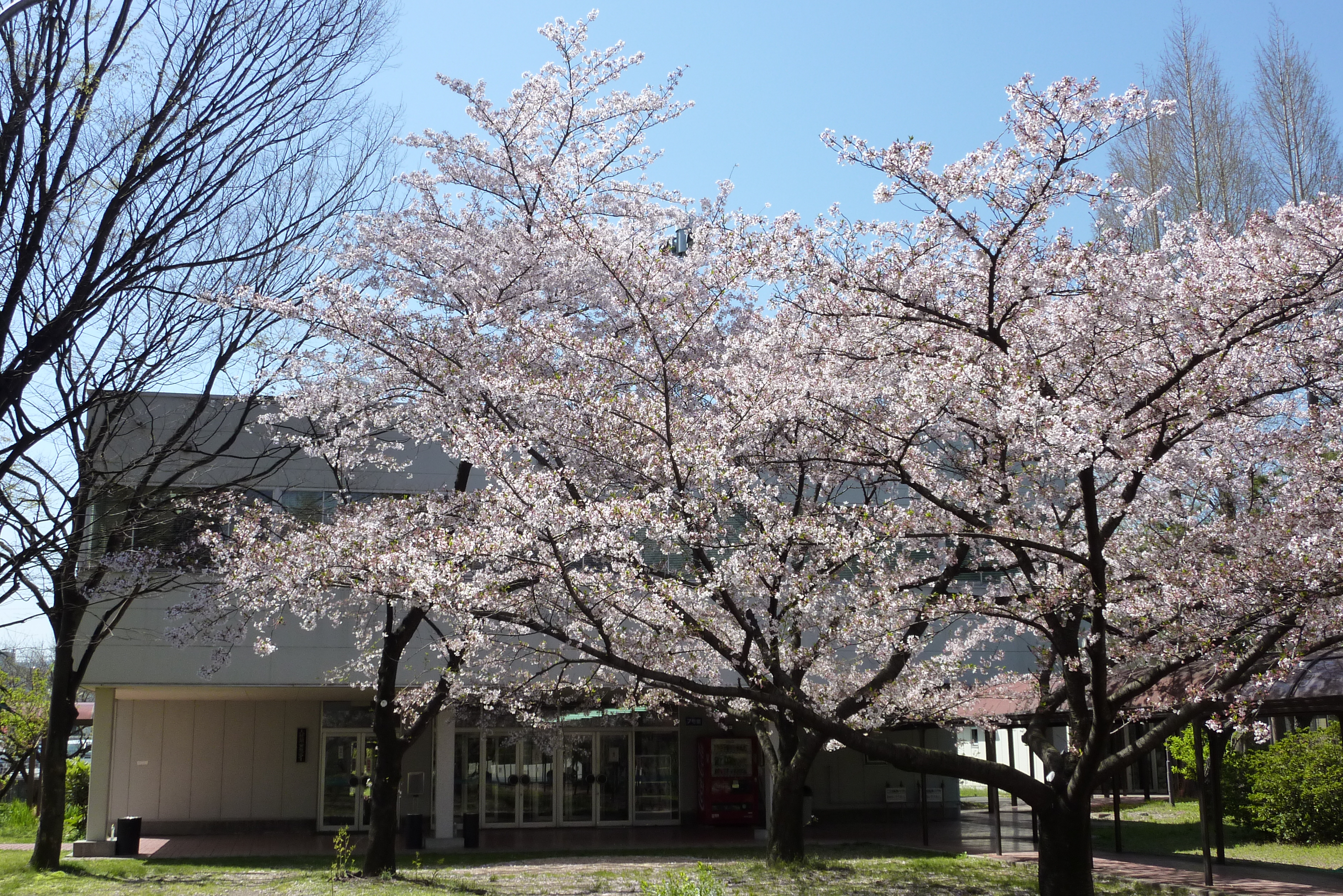 産業技術短期大学人材開発センター